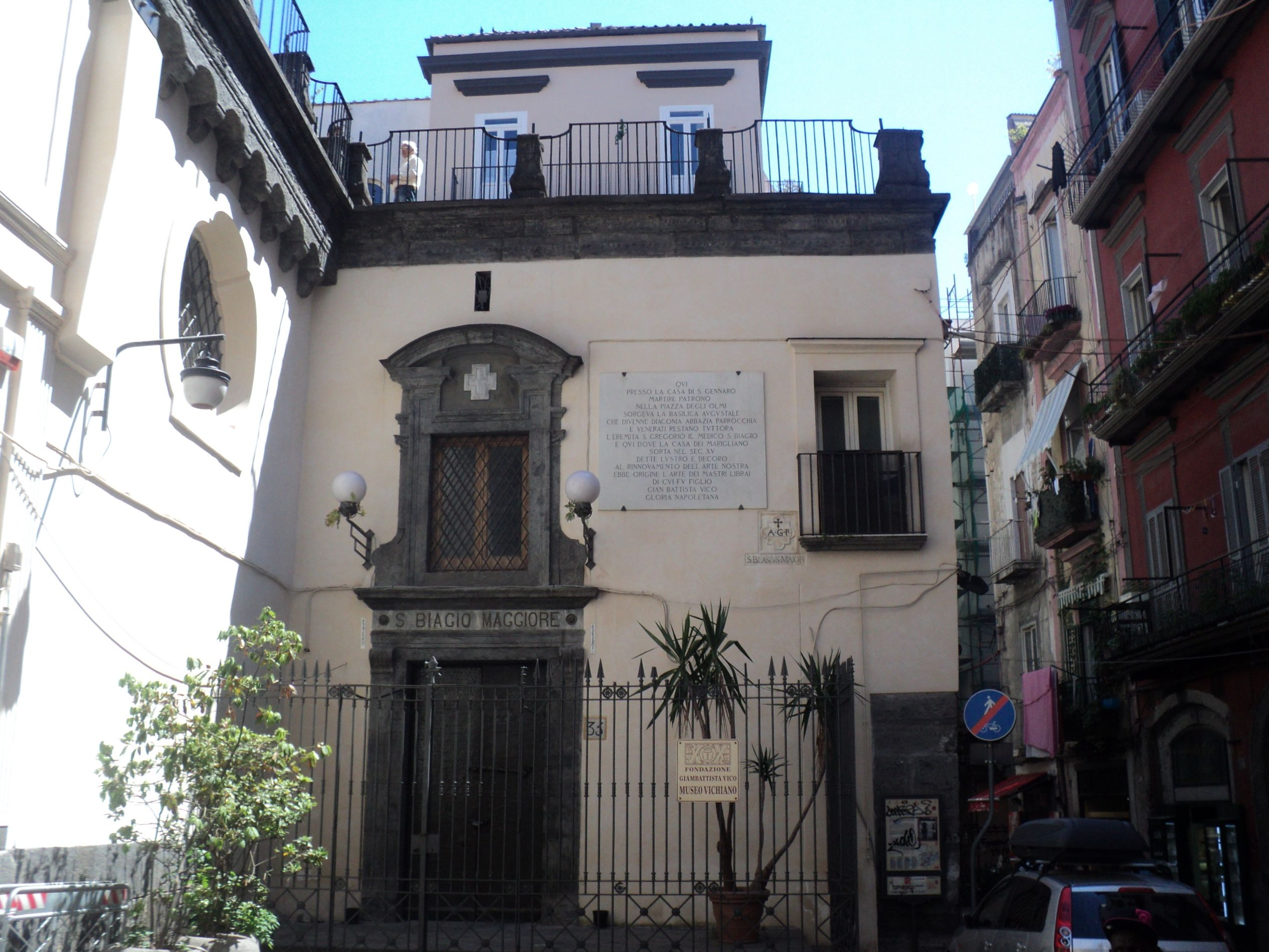 Chiesa di San Biagio Maggiore